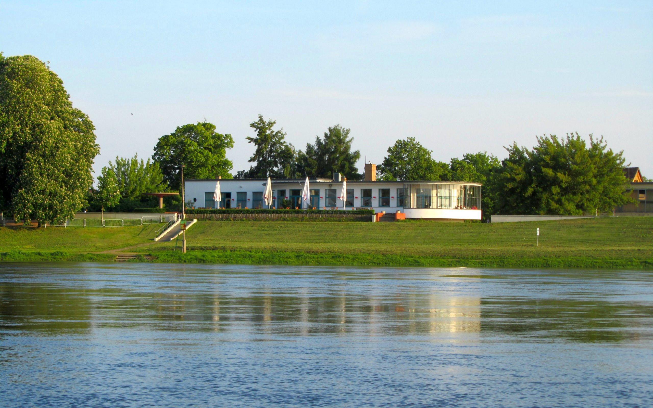 Kornhaus Dessau, Elbseite